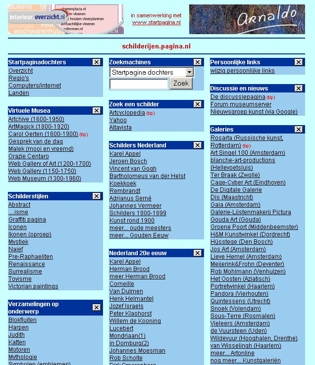 Screendump van schilderijen pagina door de beheerder van die pagina, Gebruiker:Ellywa. Ter beschikking gesteld onder GFDL.